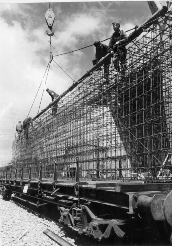 Transport von Eisengeflechten für den Bunkerbau OT-Kriegsberichter: Maier 89-43